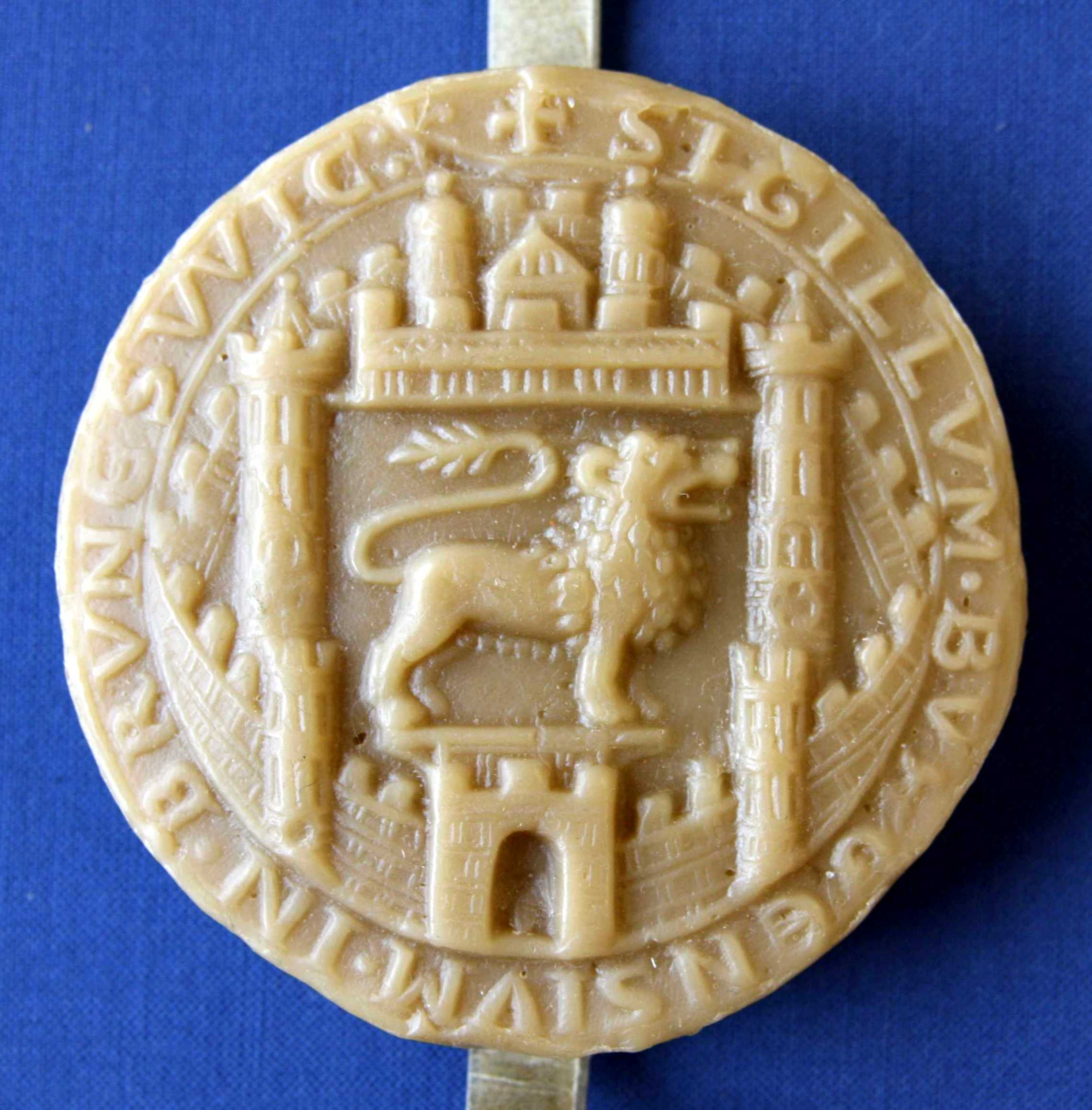 Braunschweig: Siegel der Stadt von 1231 (Faksimile-Wachsabdruck).